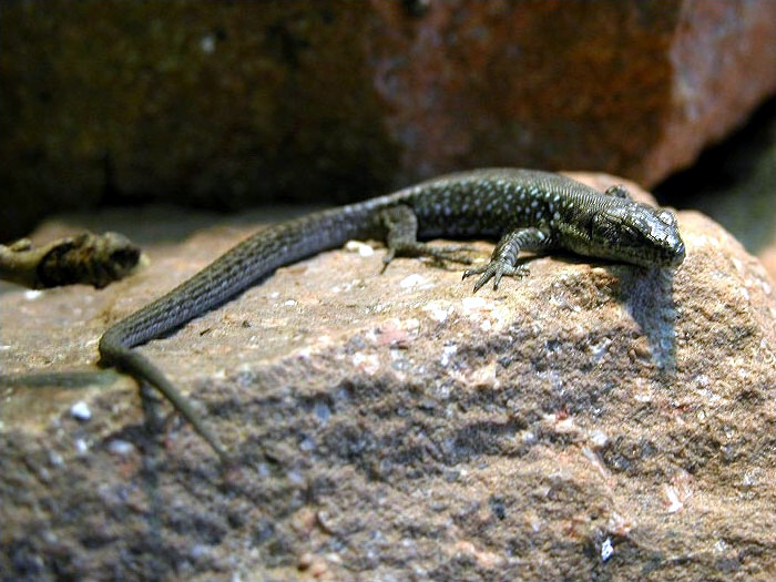 Armenische Gebirgseidechse (Lacerta armeniaca)